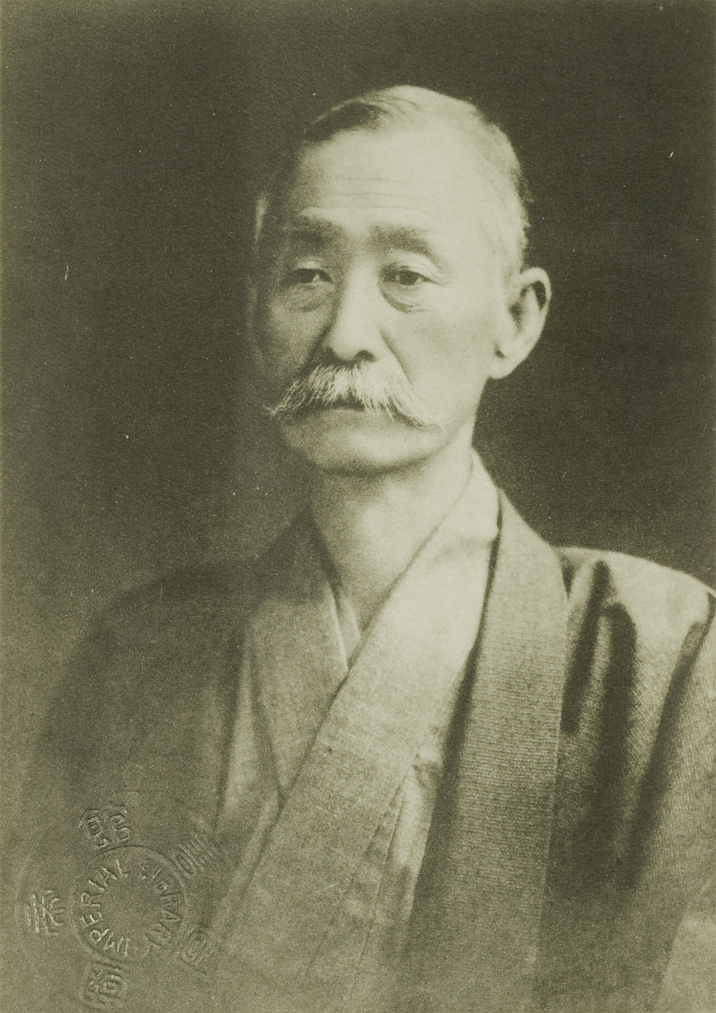 Portrait of Nakamura Yaroku (中村弥六, 1855 – 1929)